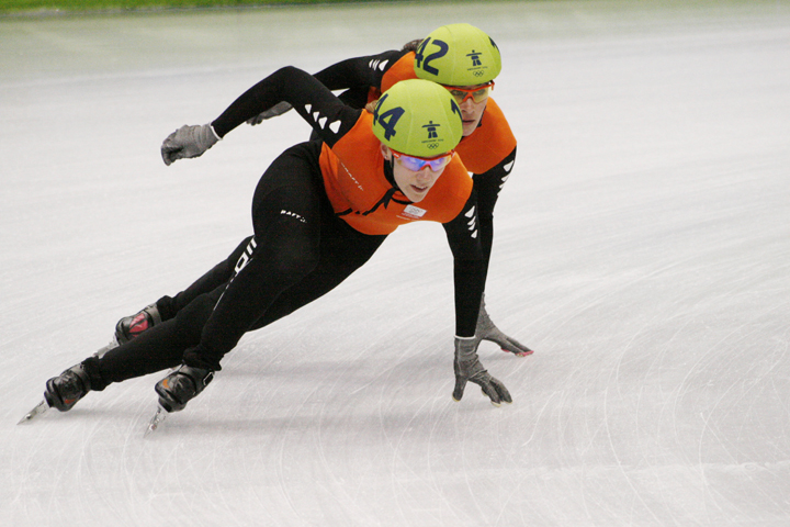 Annita van Doorn met ploeggenote Liesbeth Mau-Asam in actie tijdens de warming up van de Olympische Spelen in Vancouver 2010